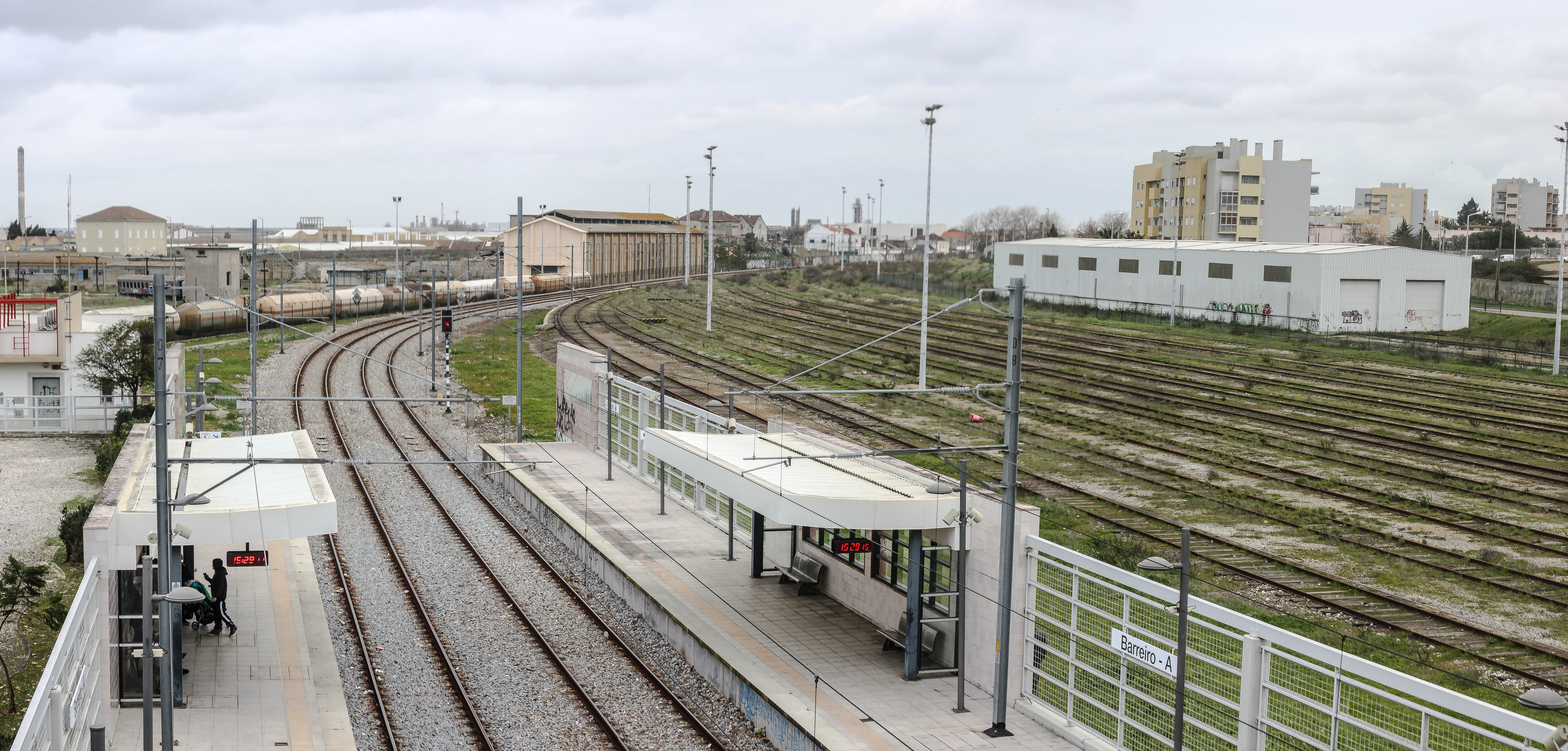 Panorama da praia de vias no apeadeiro de Barreiro-A.